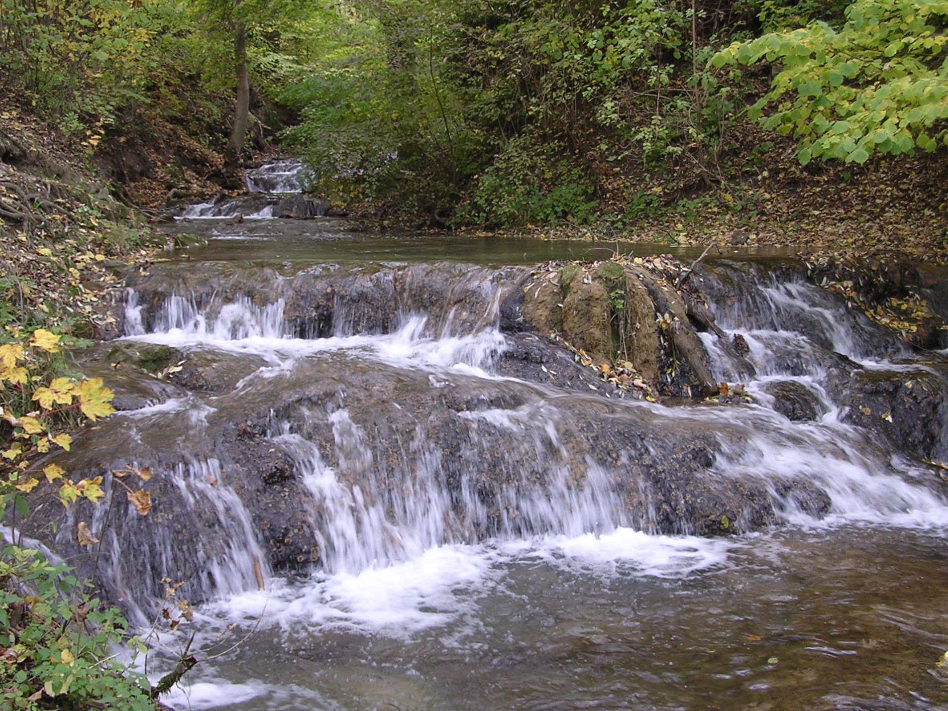 Potok Teplianka w miejscowości Lúčky (Słowacja), tuż powyżej wodospadu